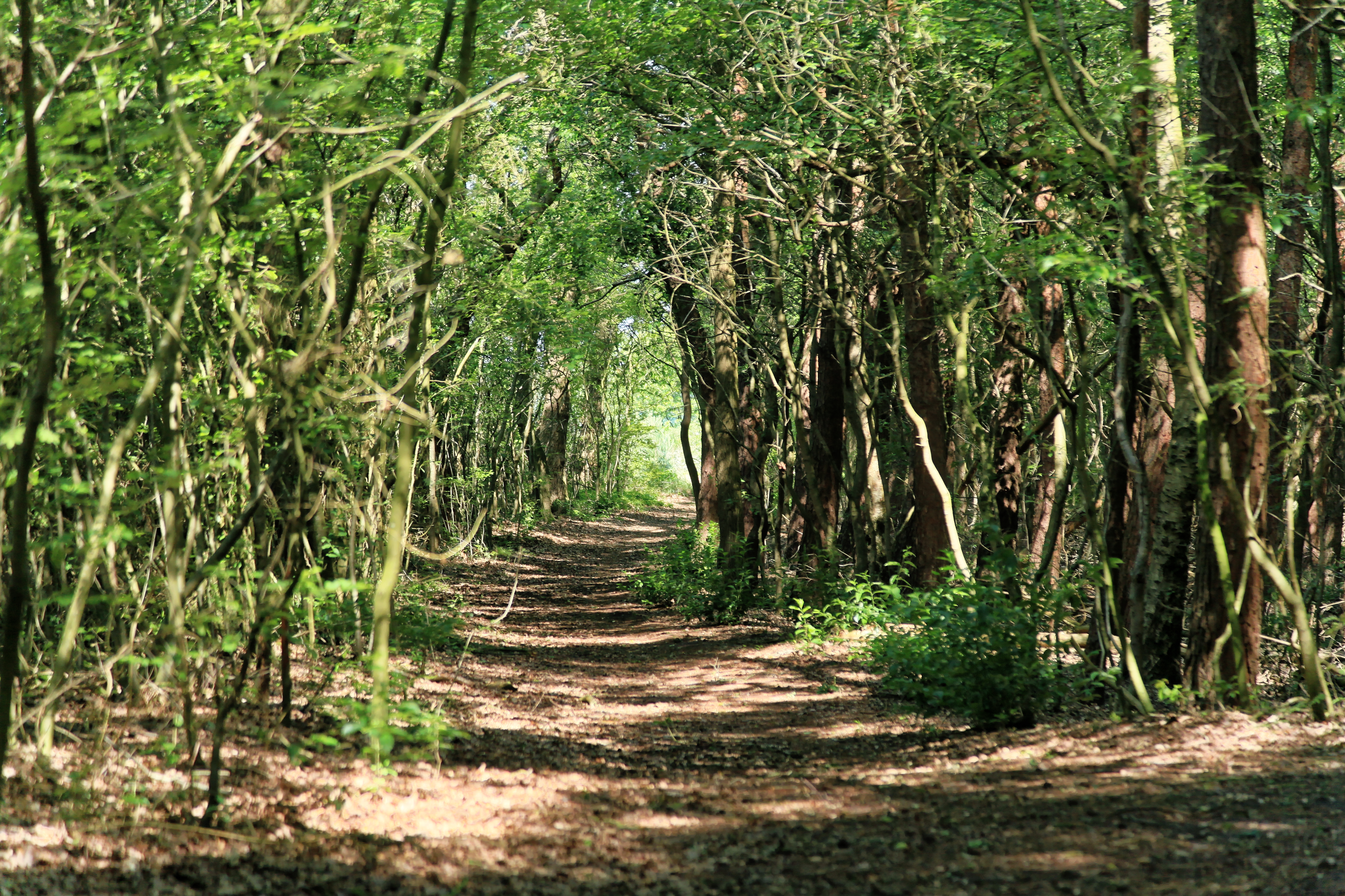 Naturschutzgebiet Dreiberg, nordöstliches Teilgebiet, Hofer Kirchweg in Papenburg